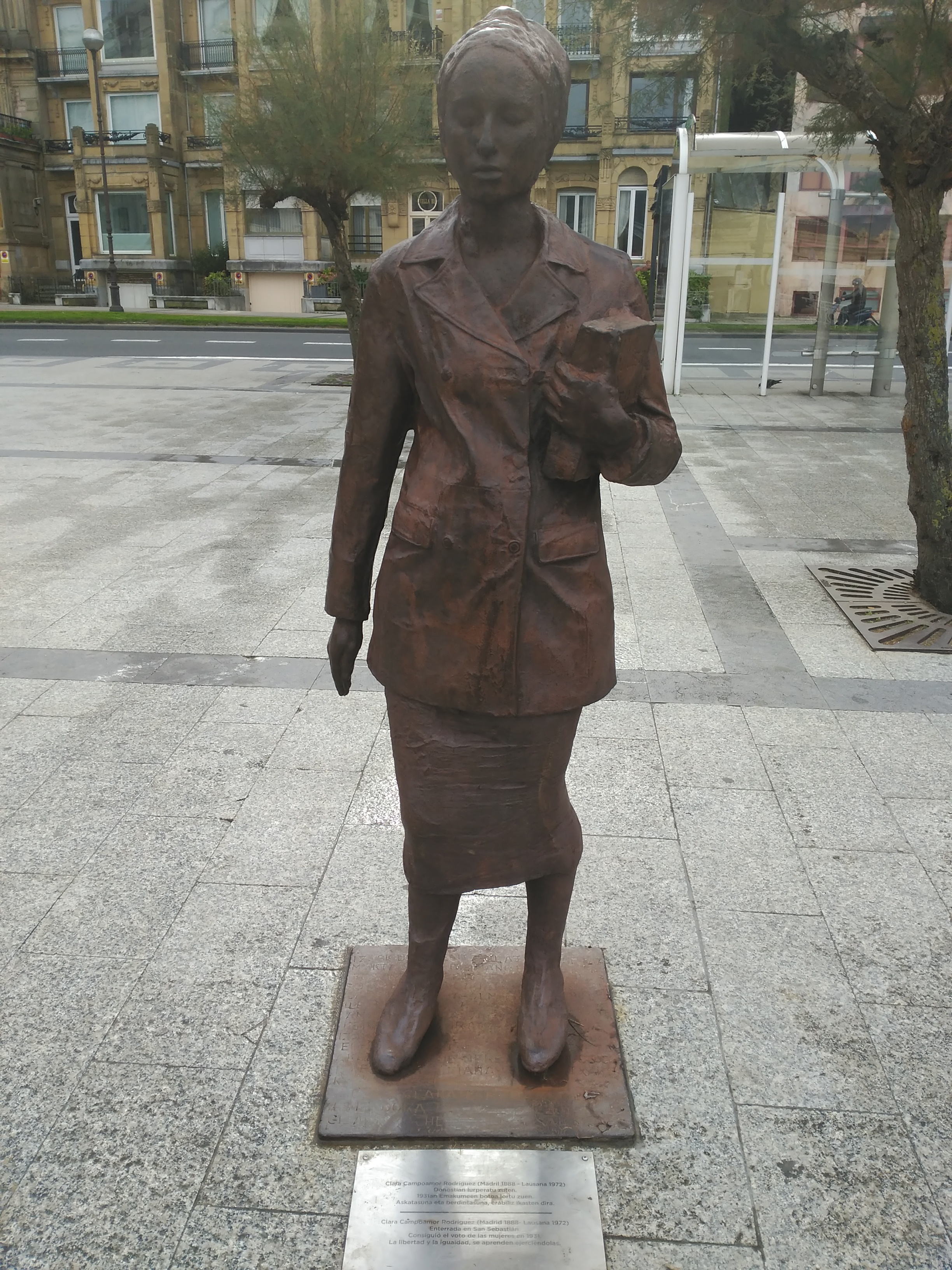 Escultura en San Sebastián